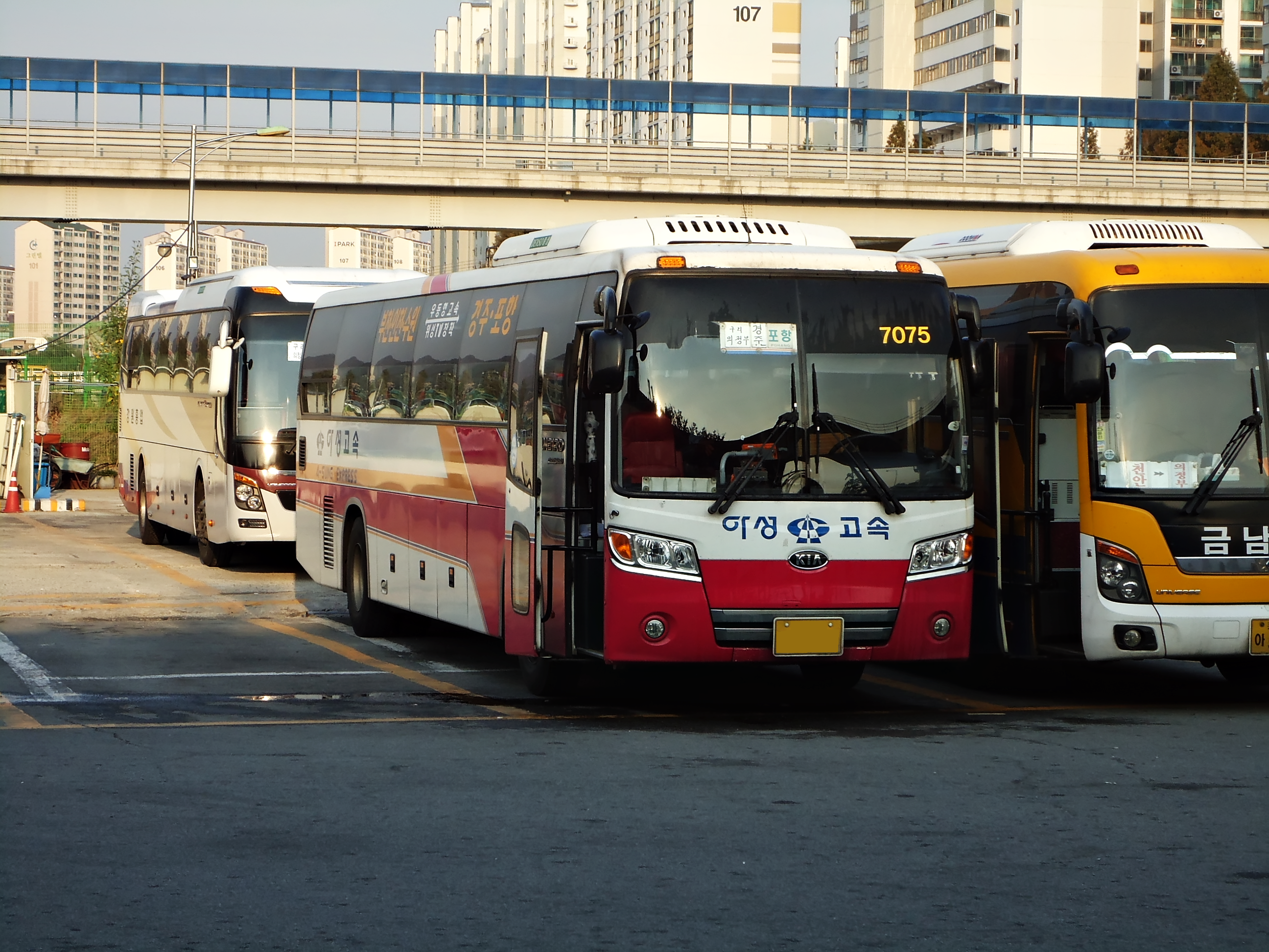 아성고속 뉴 그랜버드 파크웨이 28석 우등